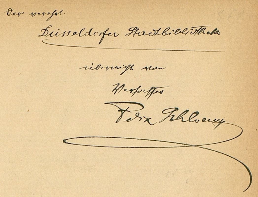 Autograph von Felix Schloemp. In: Die meschuggene Ente : die 200 ulkigsten Enten, die im Blätterwalde deutscher Zeitungen unfreiwillig ausgebrütet worden sind. 9. Auflage, München [u.a.] : Müller, 1909